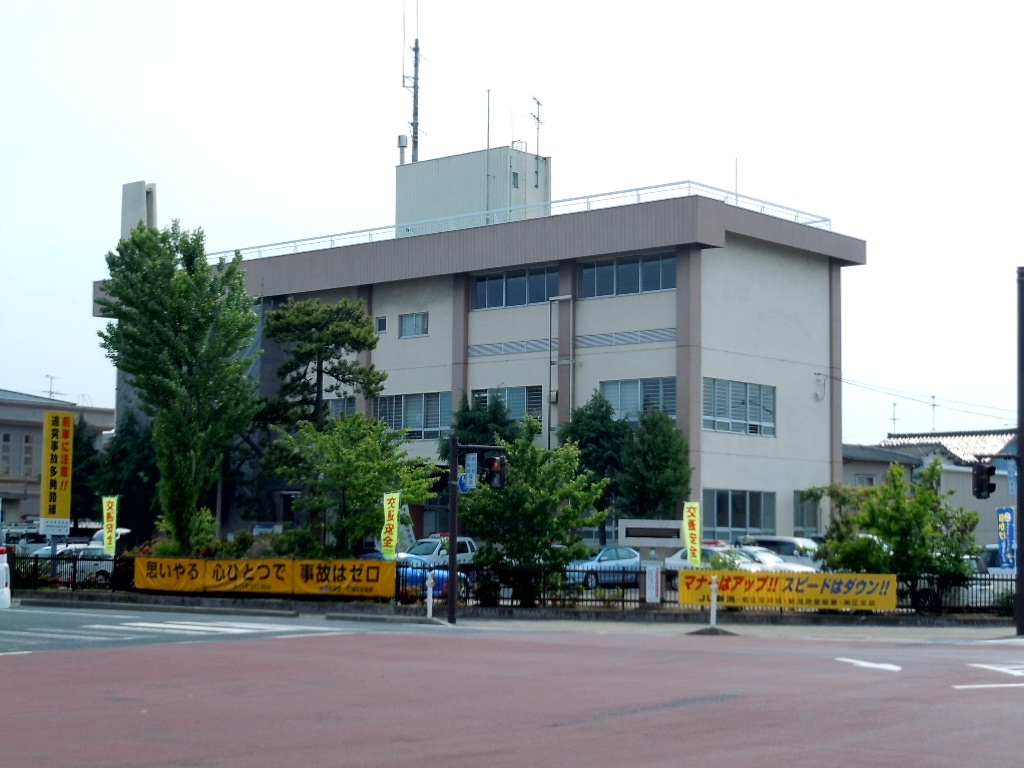 新潟南警察署